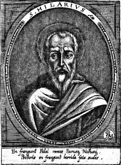 Hilarius, Stich 17. Jh. aus